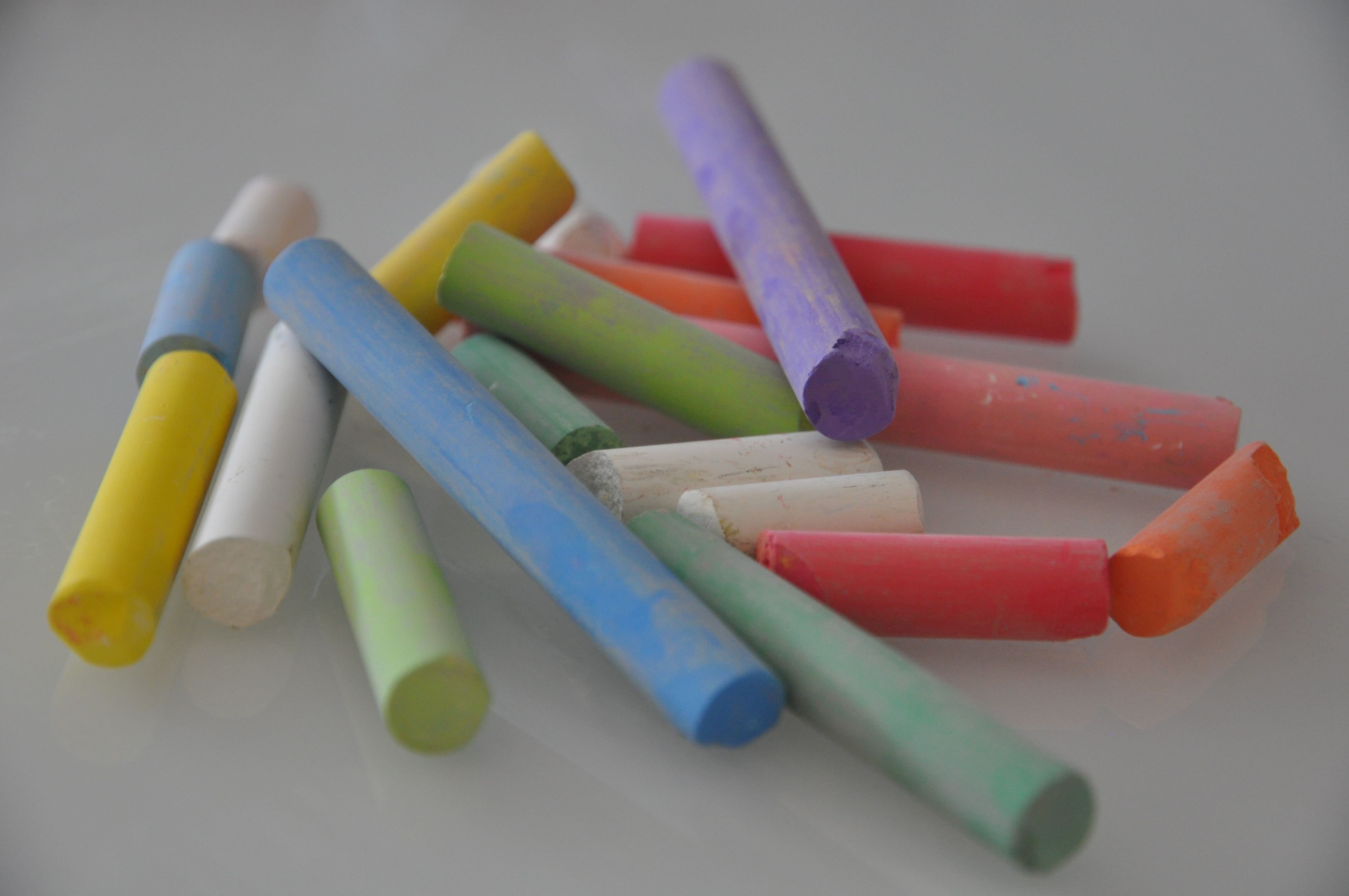 Gekleurde krijtjes.